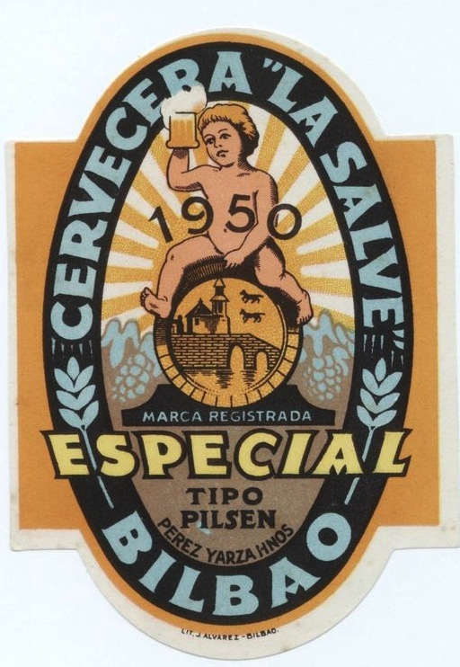 La Salve Bilbao beer label, circa 1950